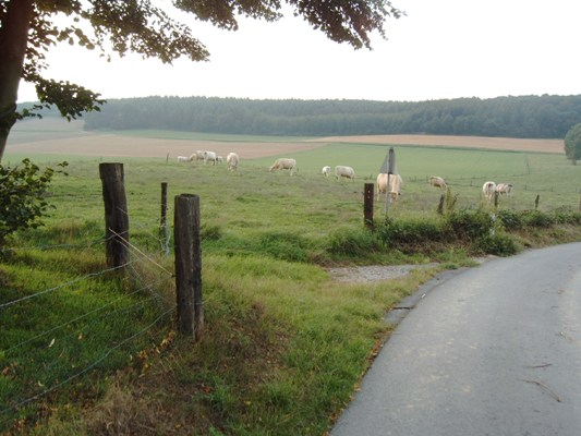 Sonsbecker Schweiz, Blick von der Wiegestraße auf den Tüschenwald.